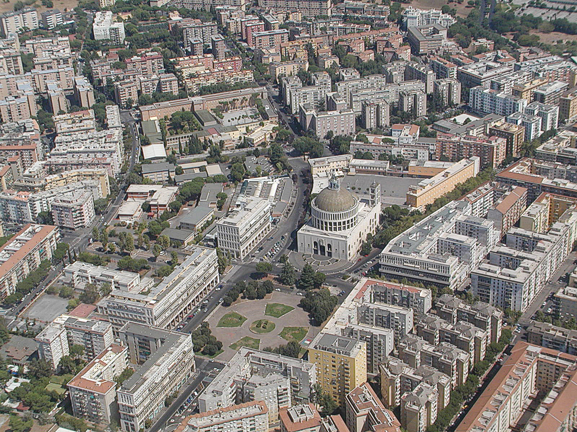 Rom - Cinecittà, quartiere Don Bosco